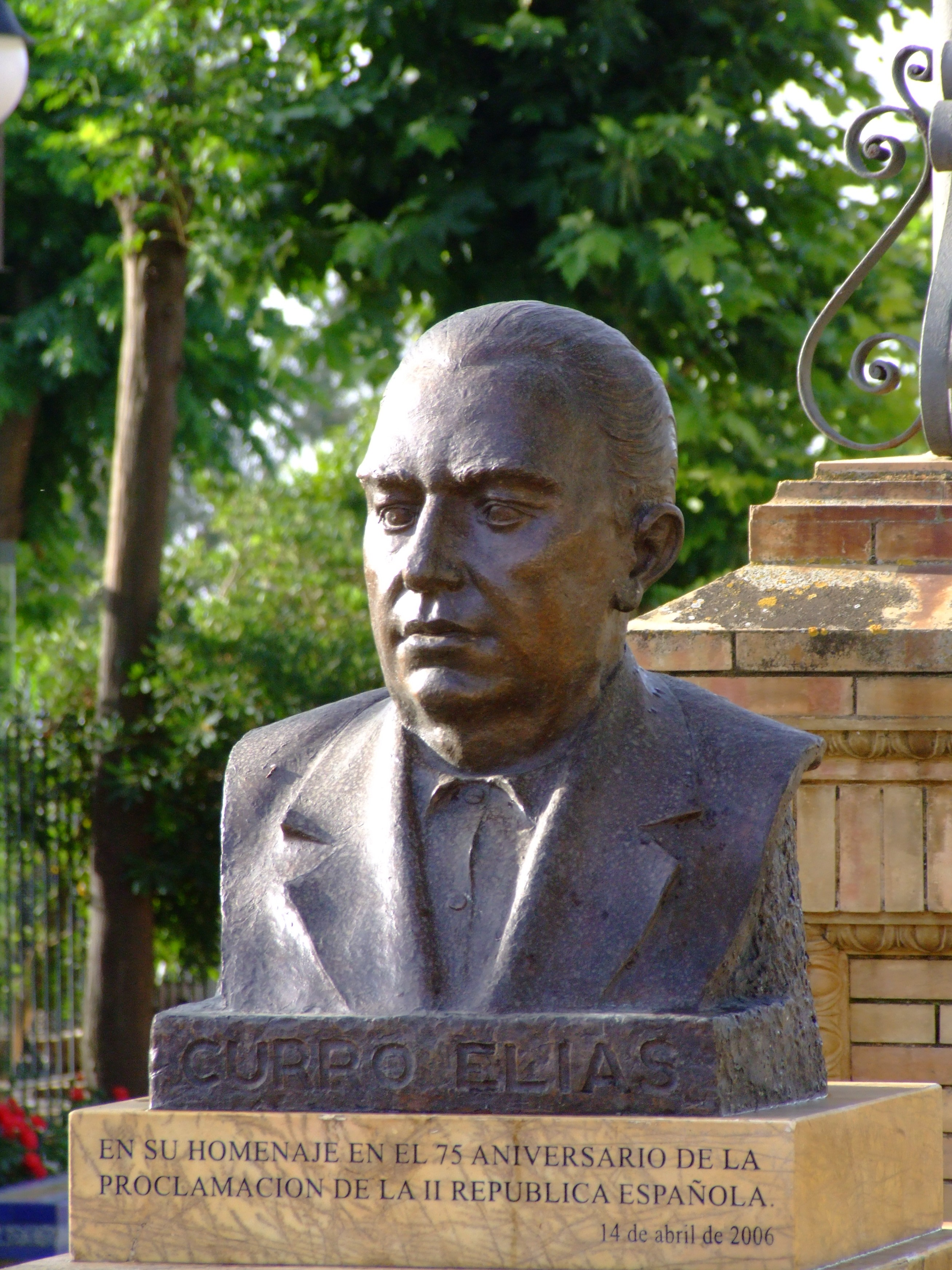 Busto de Curro Elías, Alameda de Alfonso XIII. Carmona (Sevilla)